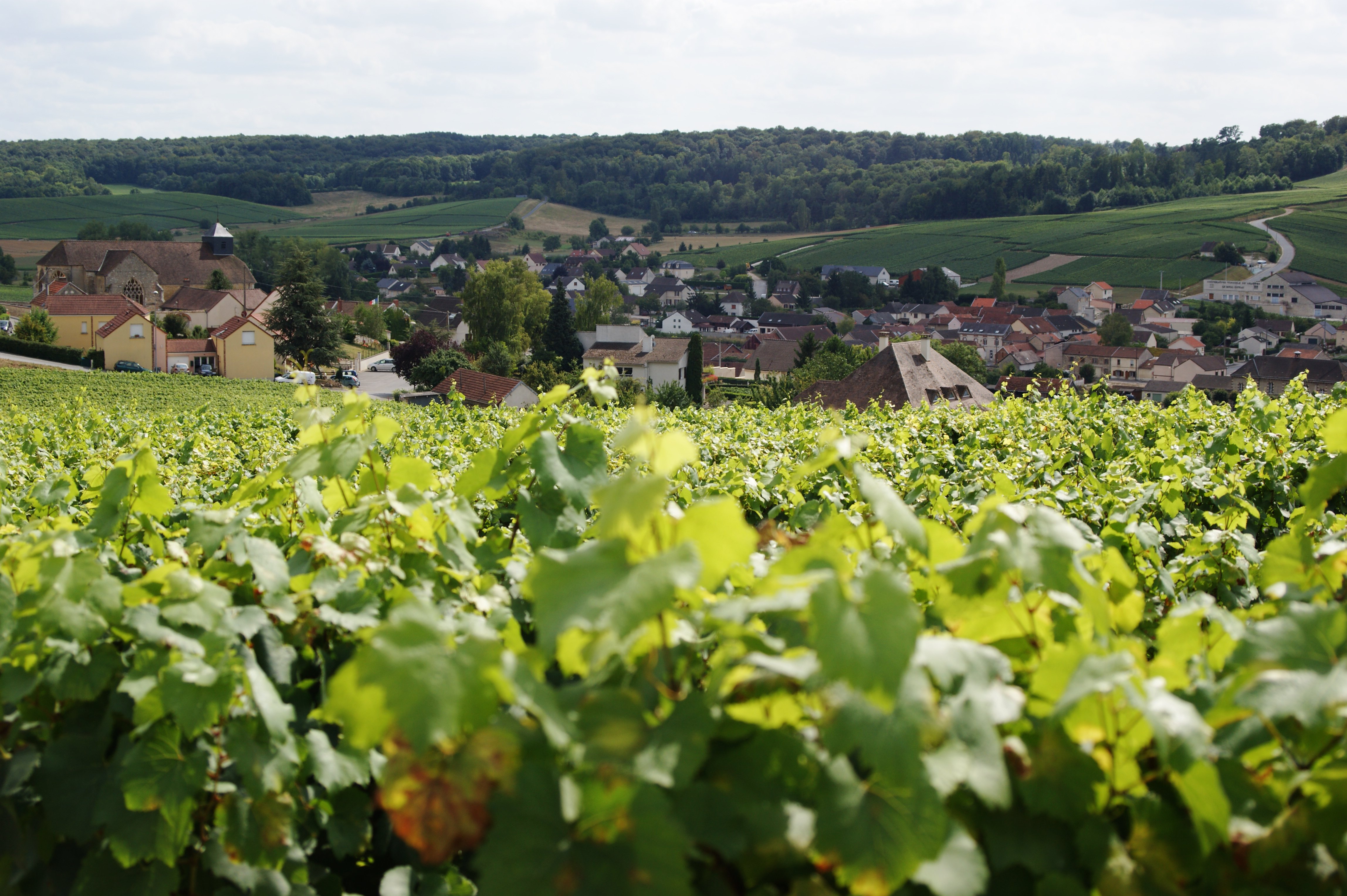 Grauves : le village vu depuis le vignoble